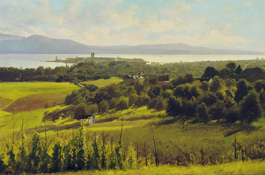 Wilhelm Bode: Blick von der Bäuerlinshalde über Lindau auf den Bodensee; Öl auf Pappe auf Holz; 36 x 52 cm